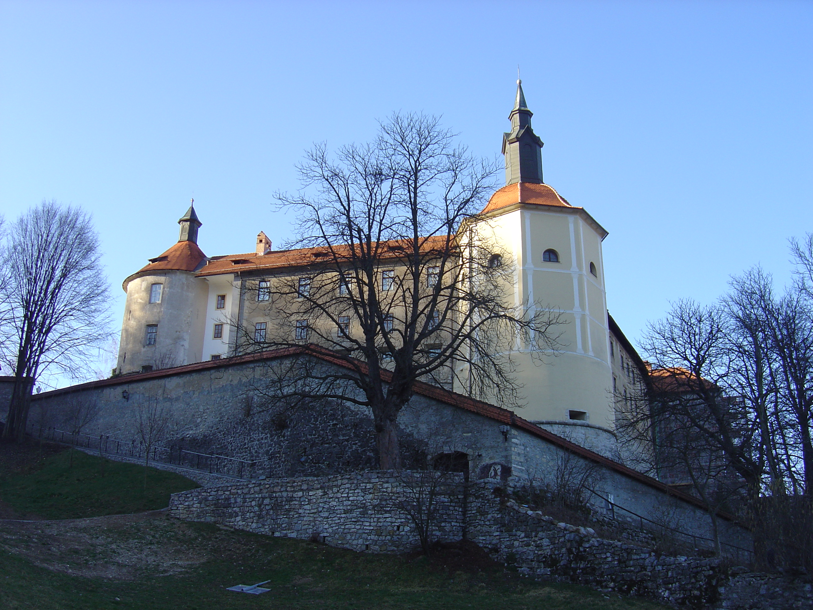 Škofja Loka, Slovenia